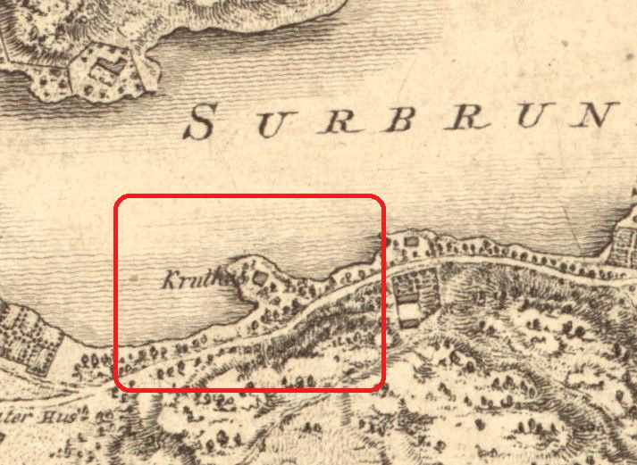 Del av 1805 års karta över Stockholm visande Framnäs udde